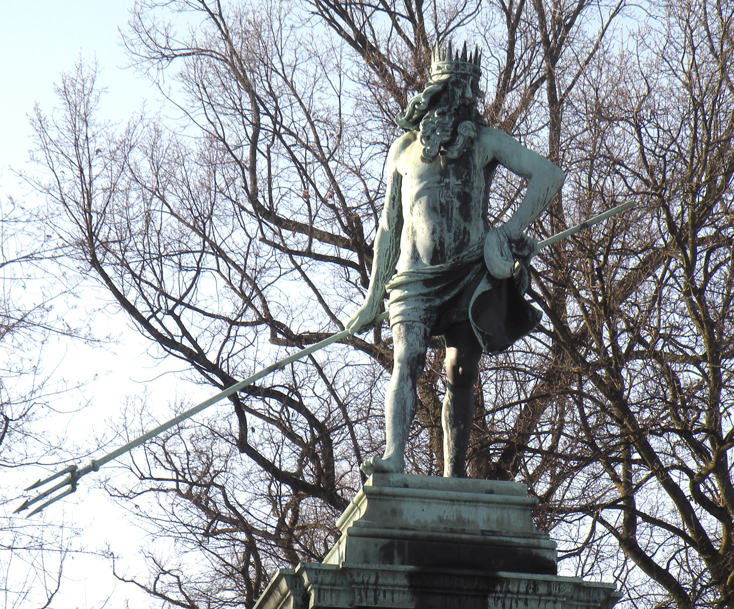 Нептун нюрнбержский